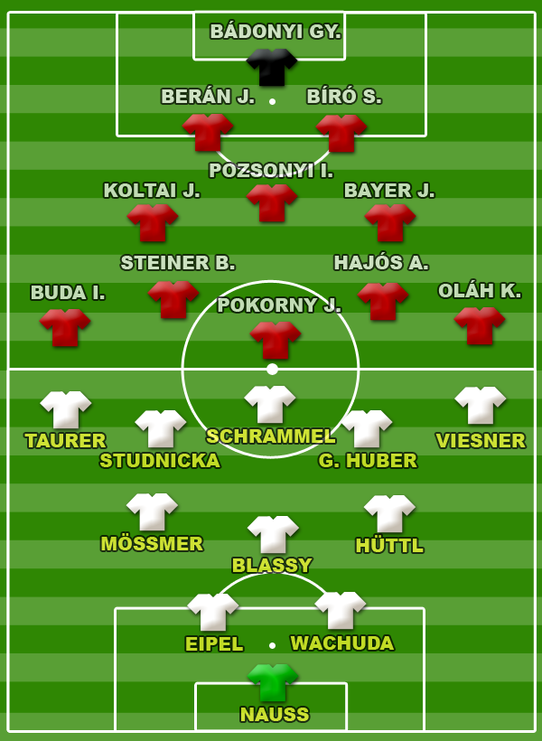 A magyar labdarúgó-válogatott első mérkőzésének taktikai felállása, Ausztria ellen, 1902. október 12.